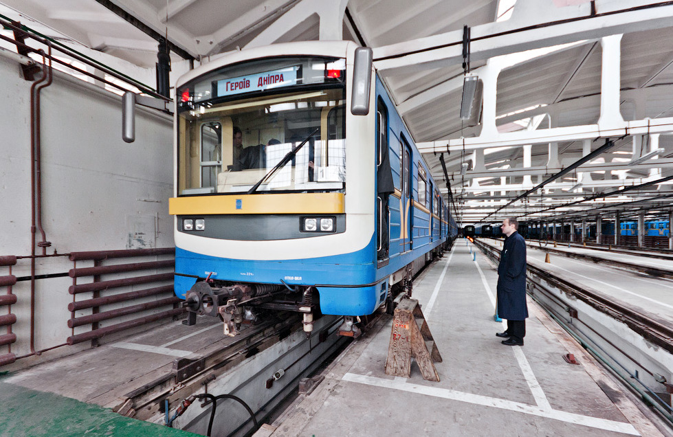 Электропоезд 81-553/554/555 Славутич в депо "Оболонь"